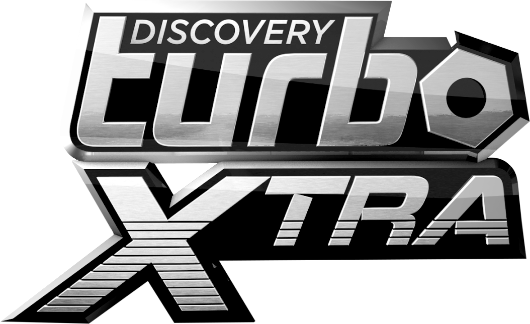 Logo kanału Discovery Turbo Xtra.